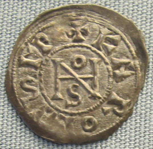 Stato della chiesa, giovanni VIII con carlo il grosso, 881-882